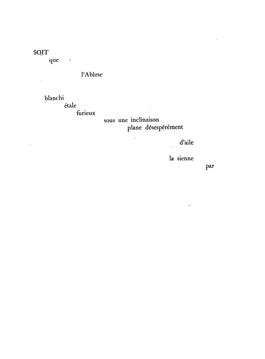 Un coup de dés jamais n'abolira le hasard